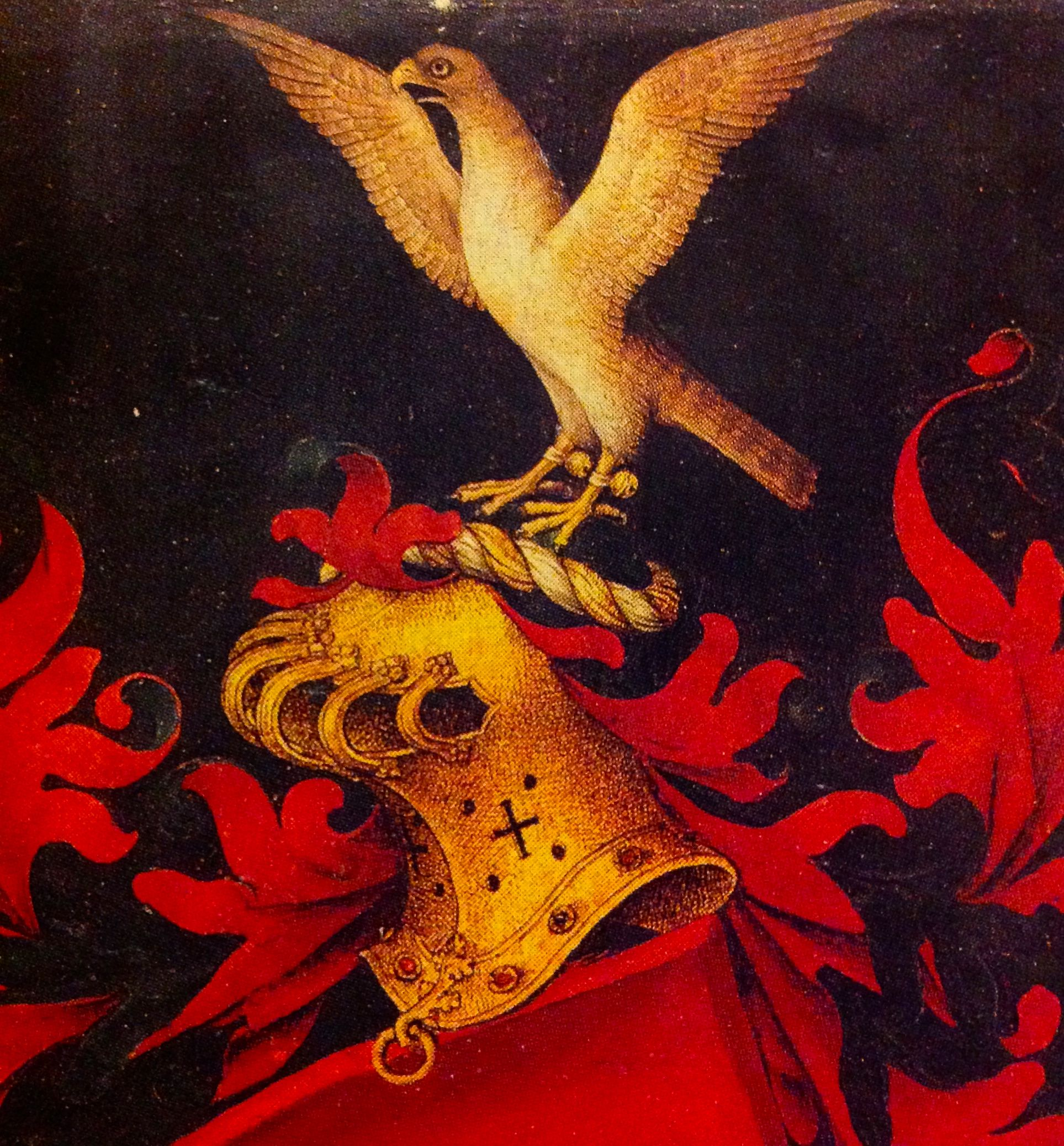 Blason sur le dos du Portrait d'un homme de la famille Lespinette de Memling, d'un homme en prière devant un personnage